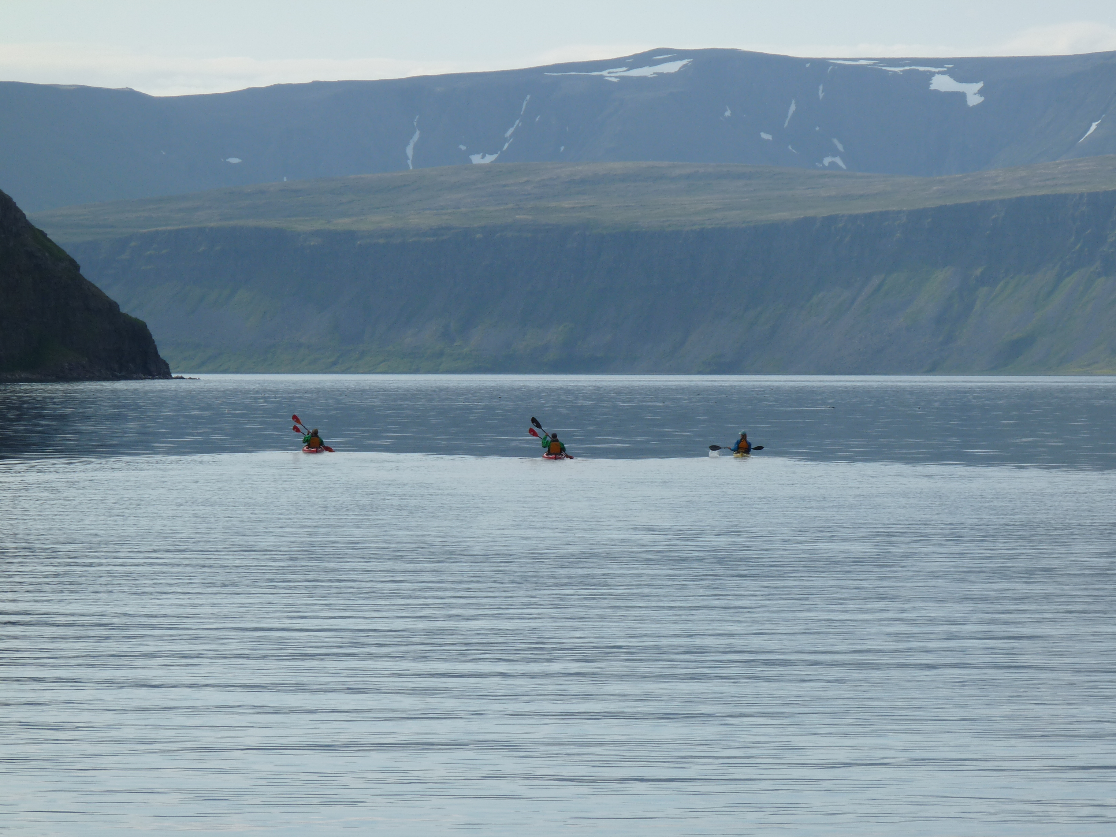 Jökulfirðir